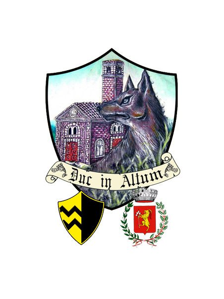 Stemma della Contrada Viarella